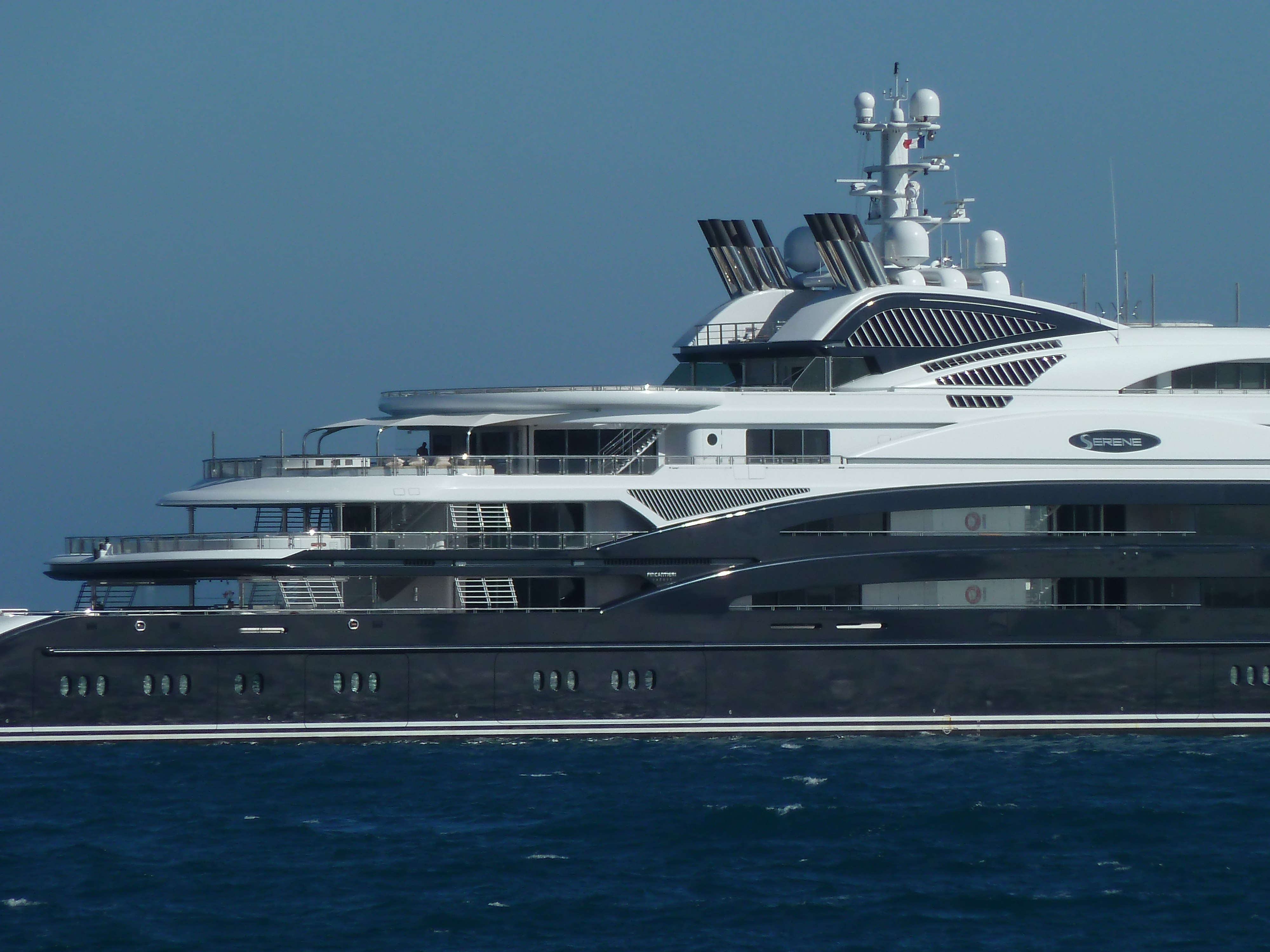 Serene